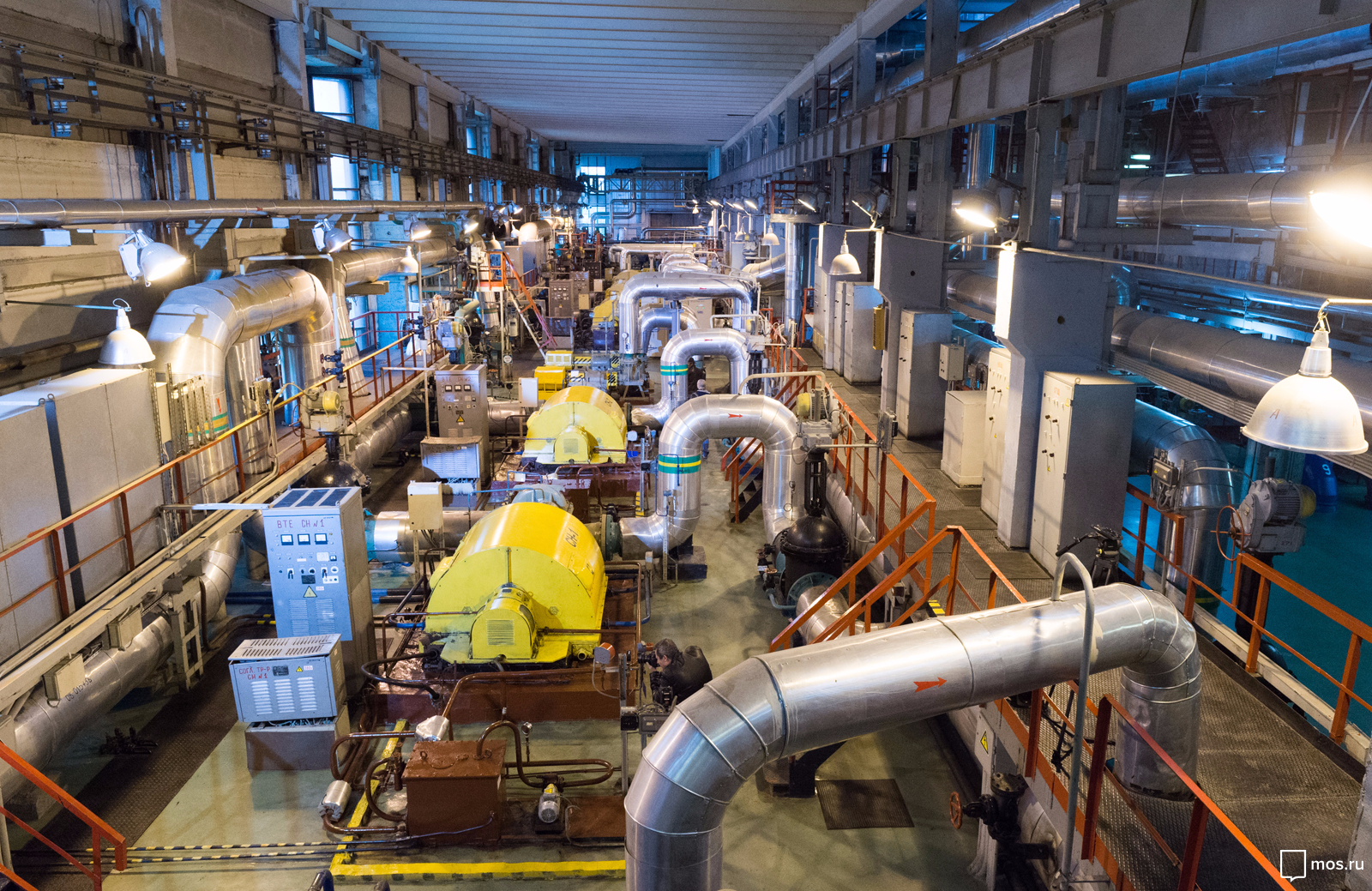 Районная тепловая станция «Крылатское» (сентябрь 2016).